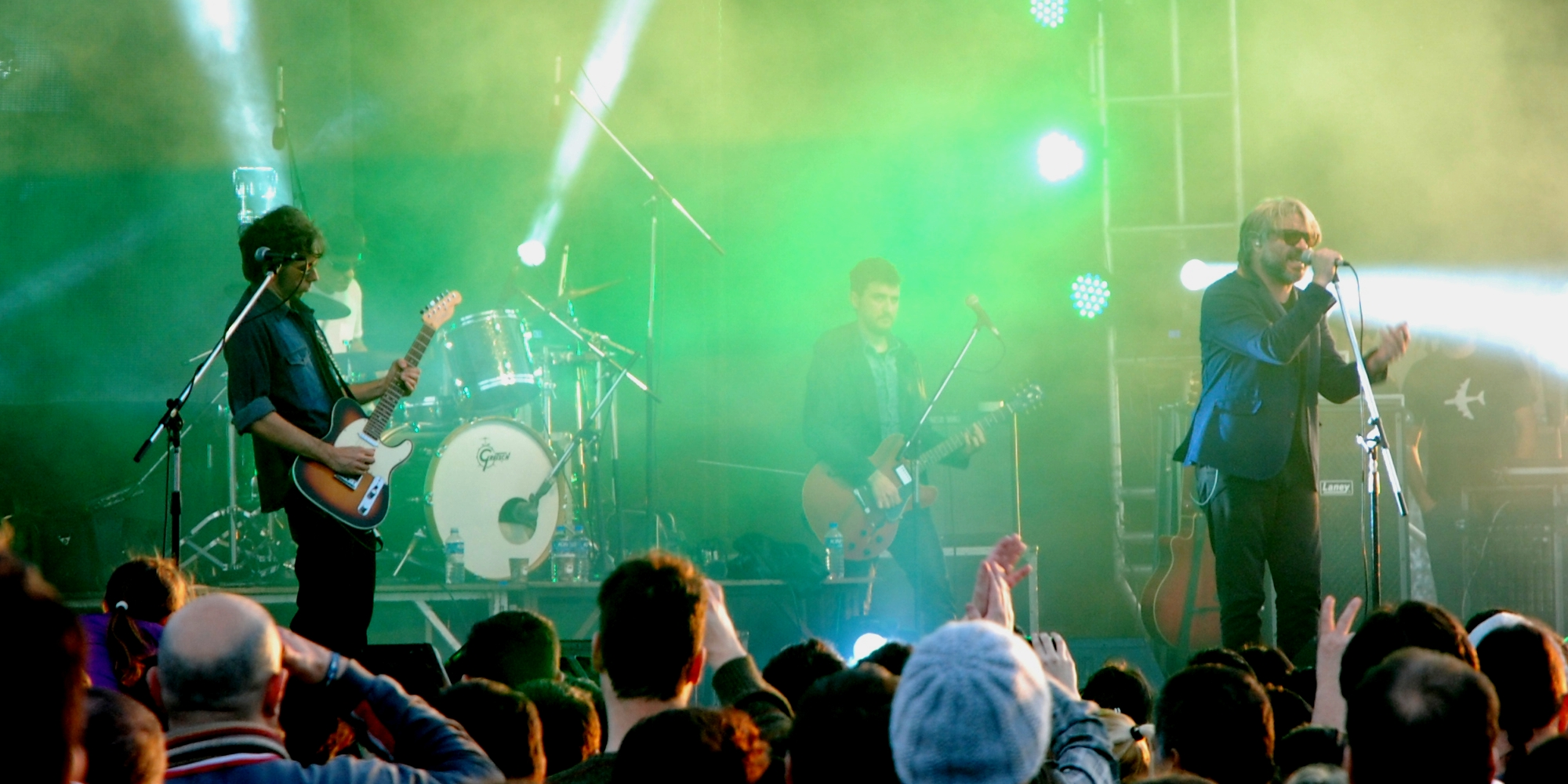 Estelares en 19 y 72, La Plata.